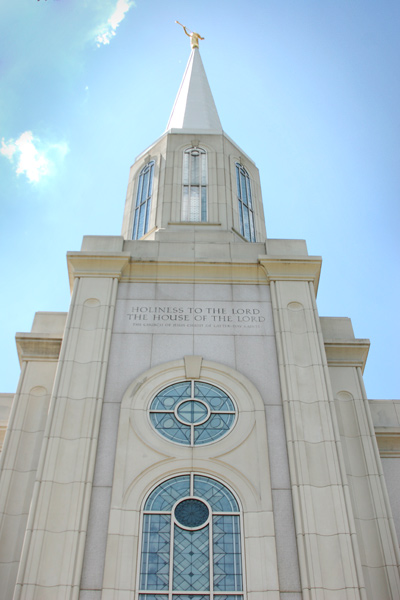 St. Louis Missouri Temple